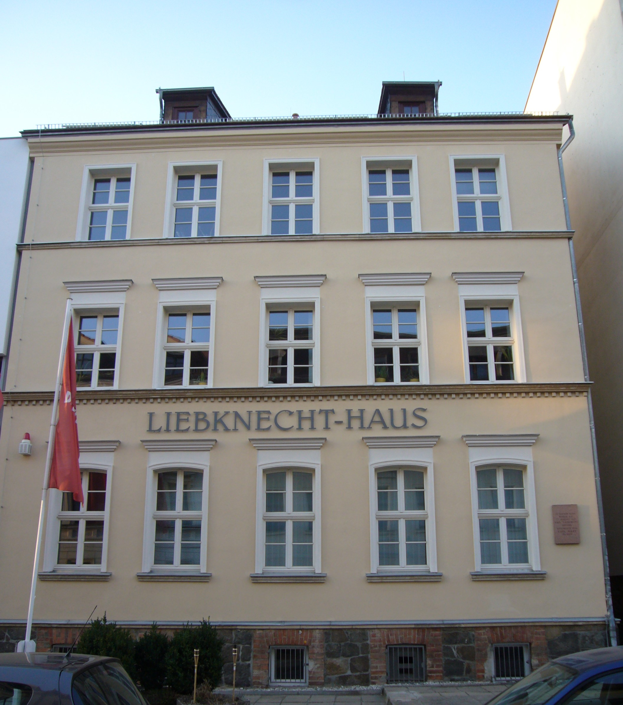 Geburtshaus Karl Liebknecht (Leipzig)